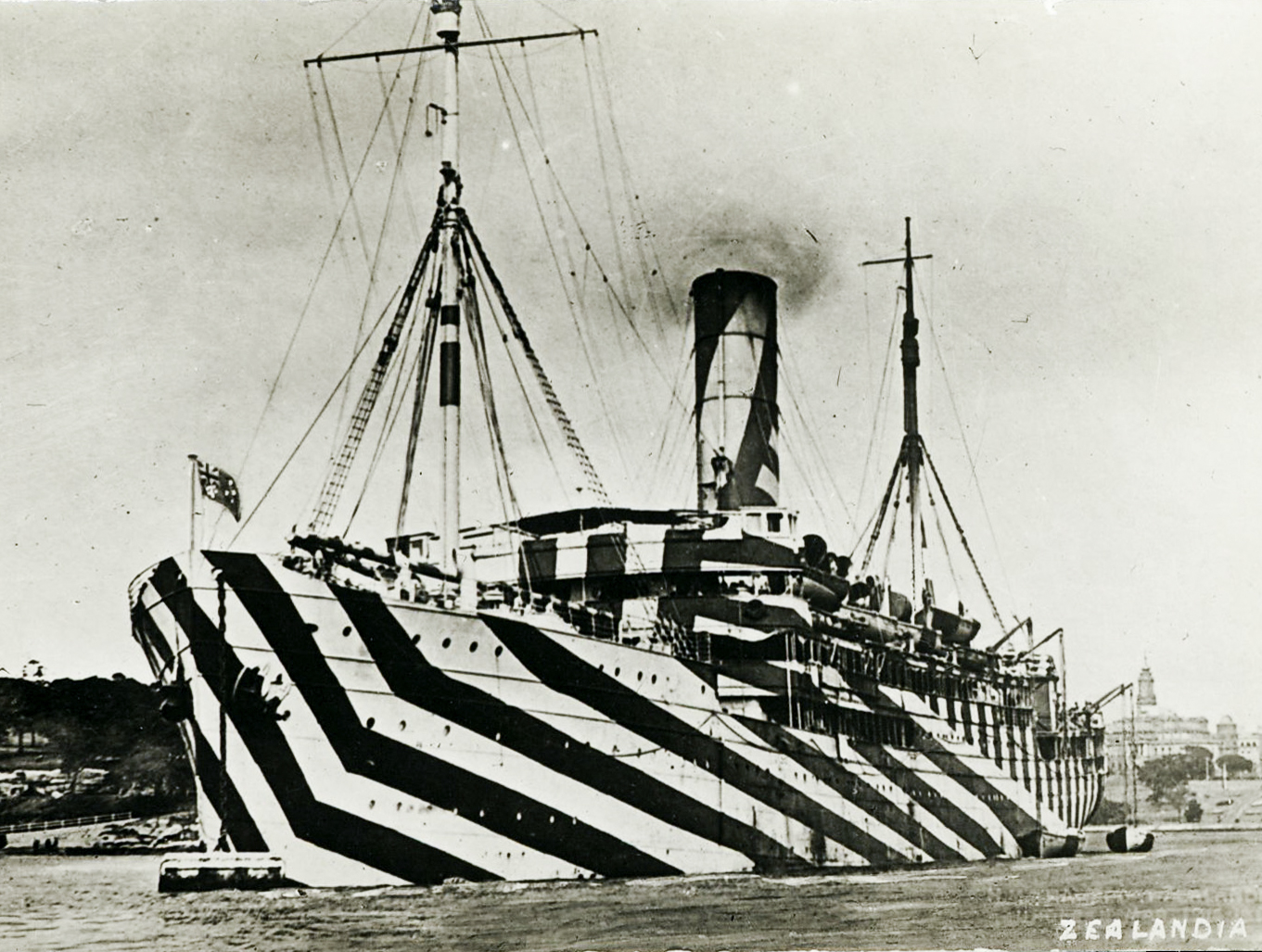 Navio de passageiros Zealandia com camuflagem disruptiva em tempo de guerra